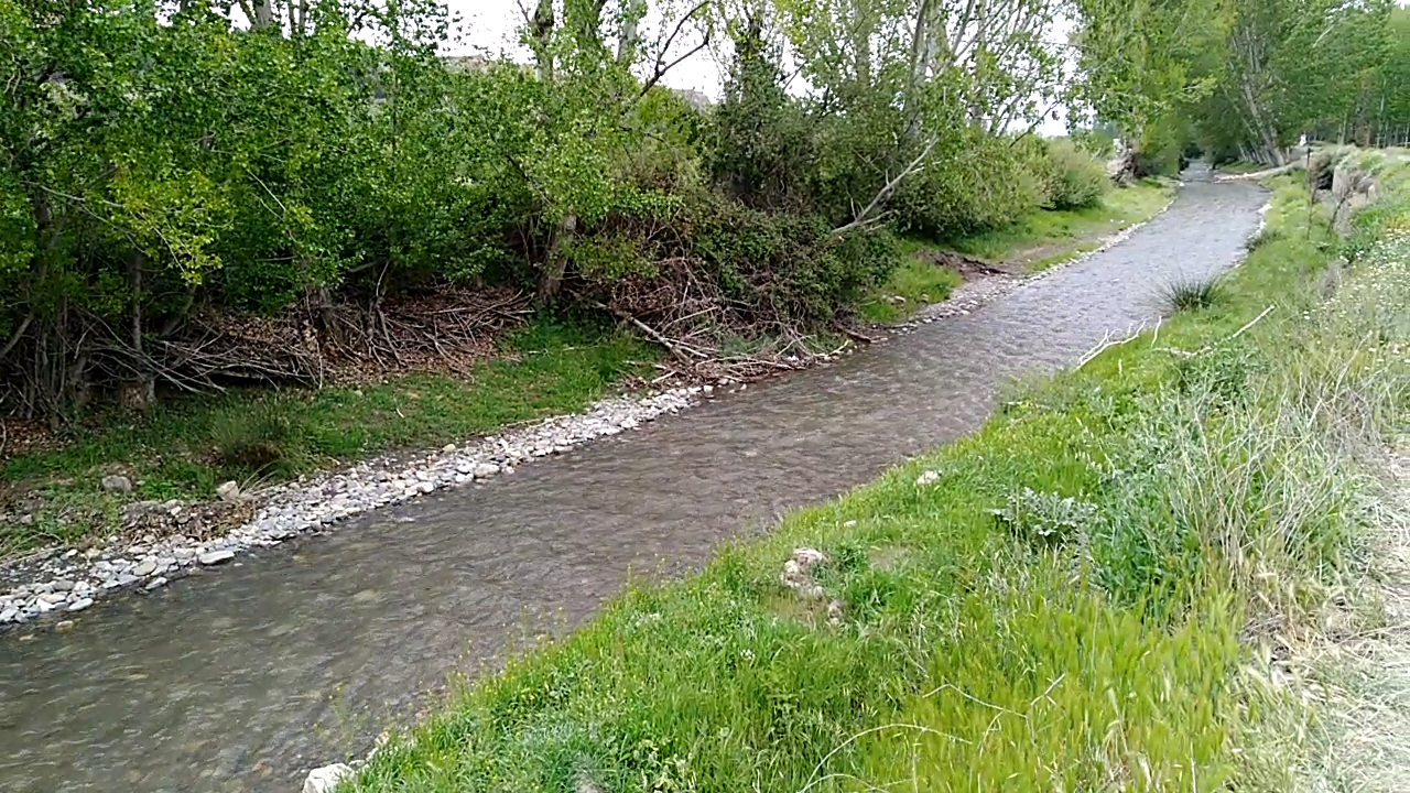 Río Verde a su paso por Valle del Zalabí